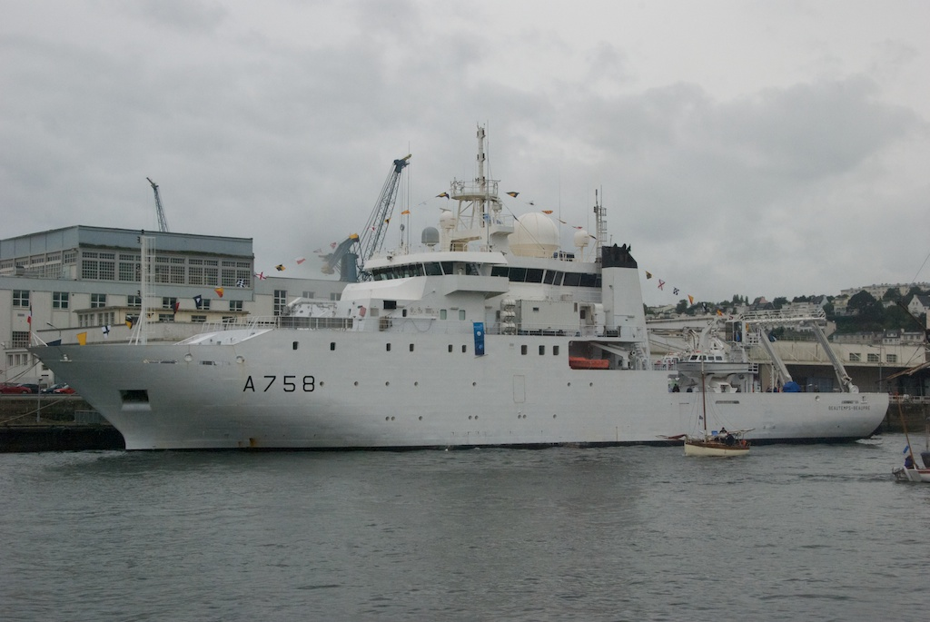 Tonnerres de Brest BHO Beautemps-Beaupré